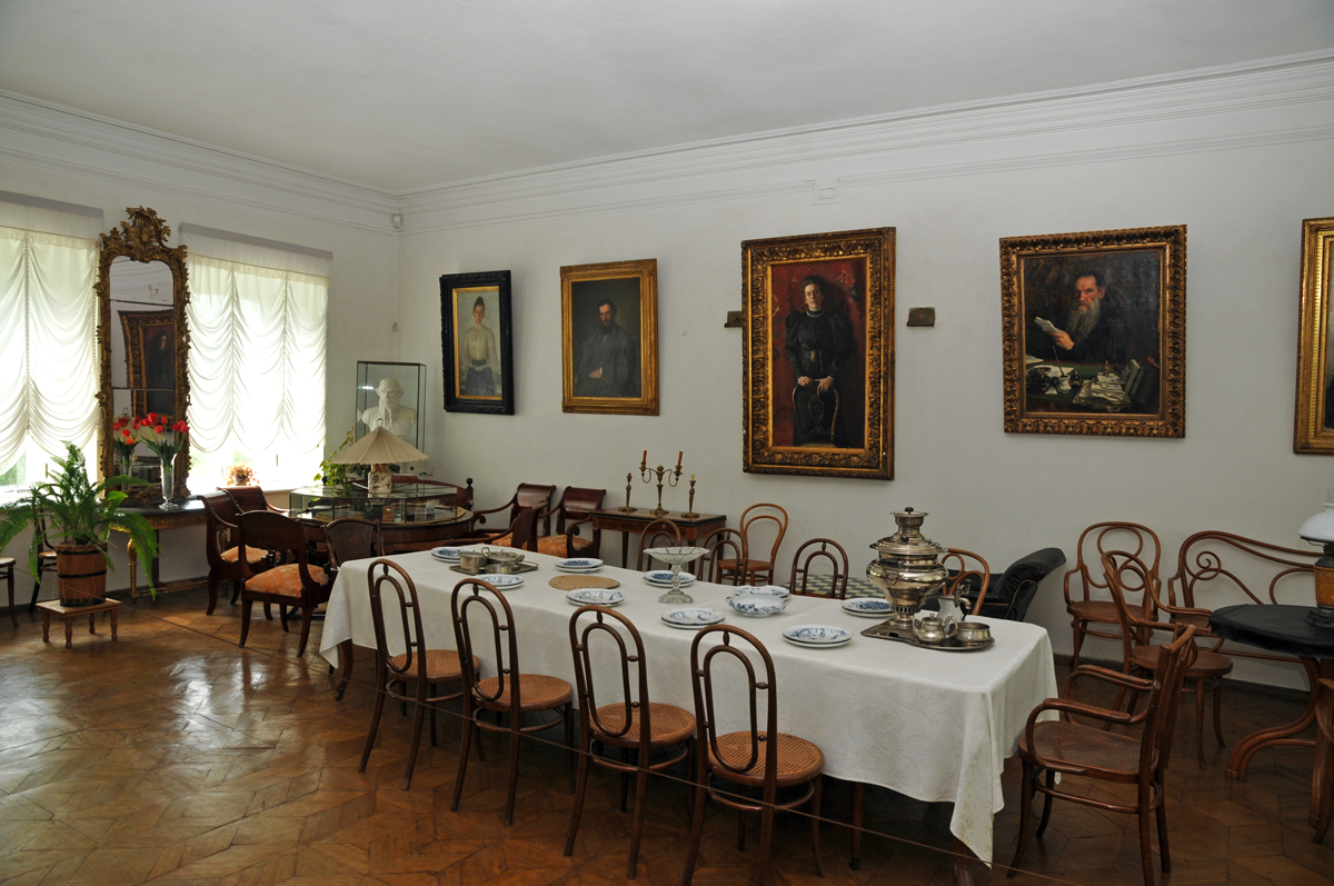 La sala da pranzo all'interno della casa museo di Lev Tolstoj a Jasnaja Poljana